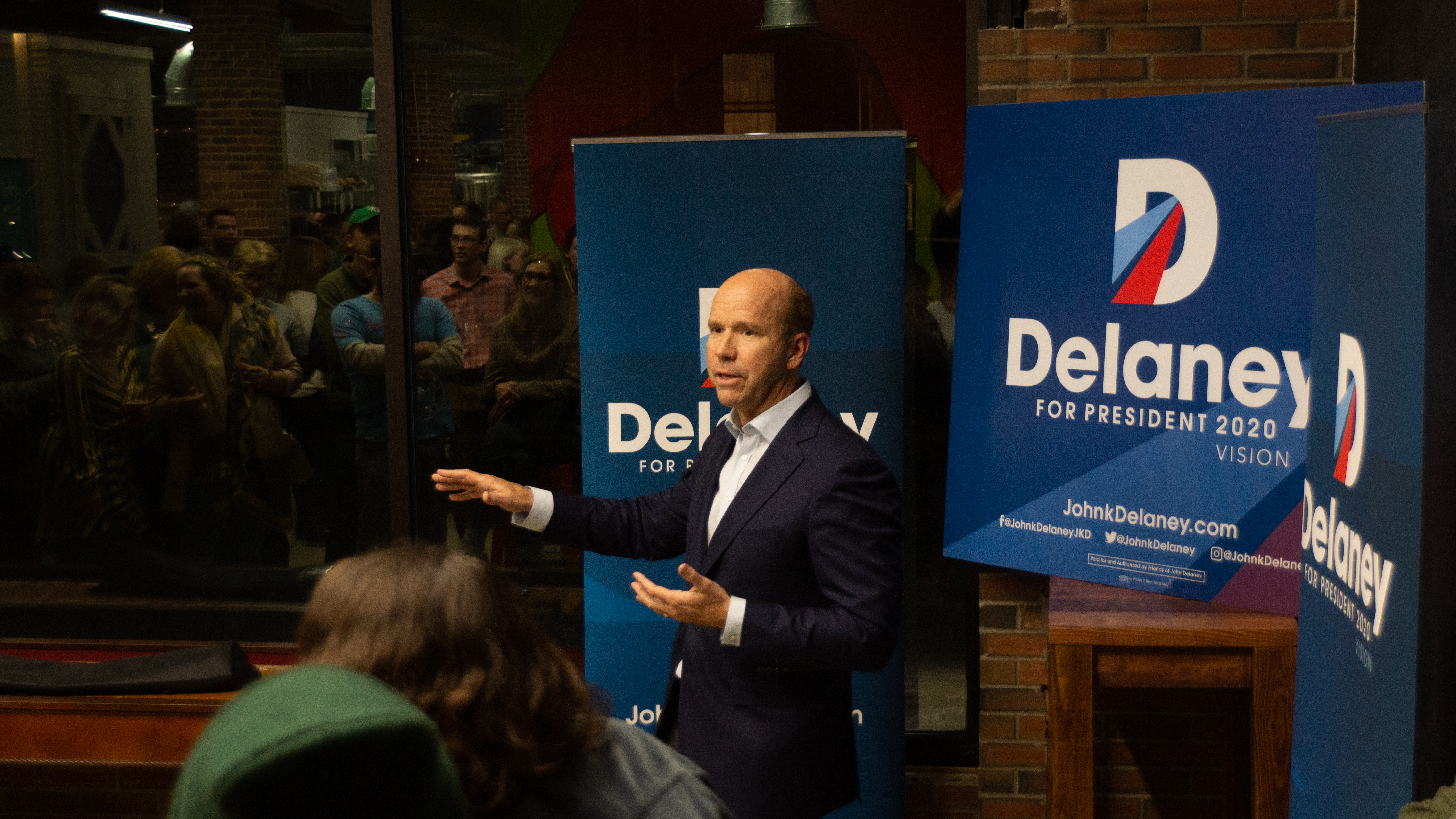 John Delaney